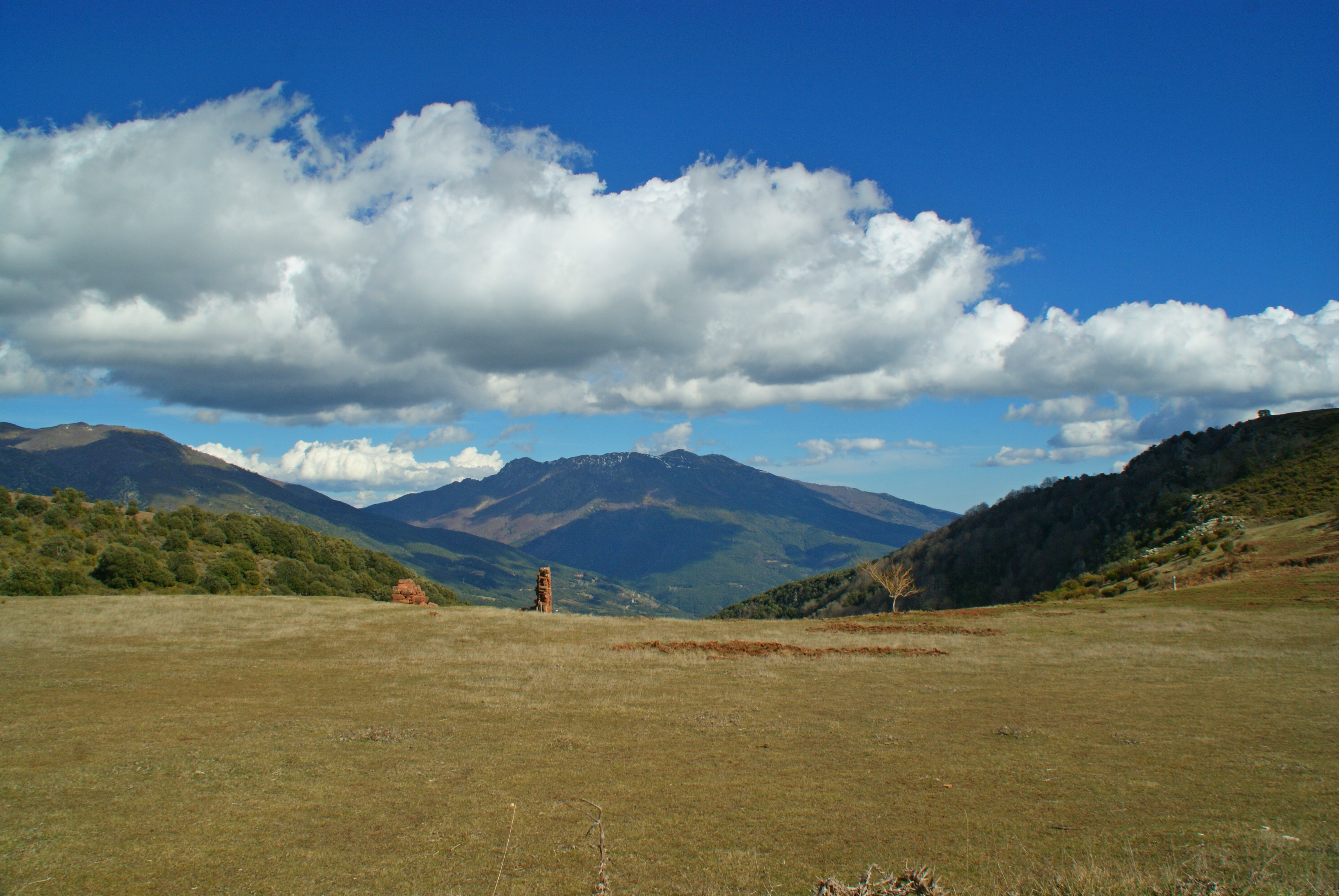 Massis del Montseny This is a a photo of a natural area in Catalonia, Spain, with id: ES510131